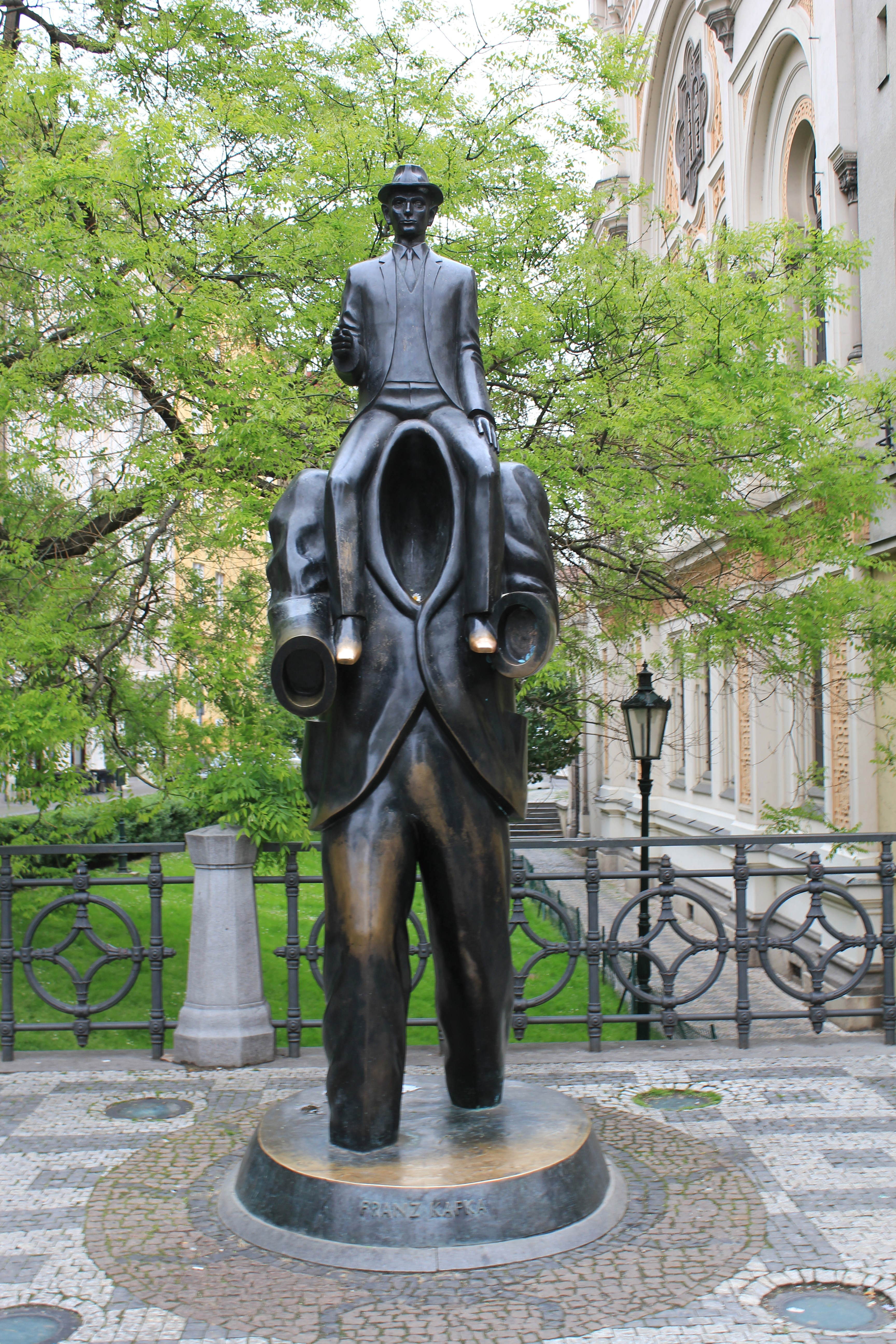 Franz Kafka statue by Spanish Synagogue in Josefov.